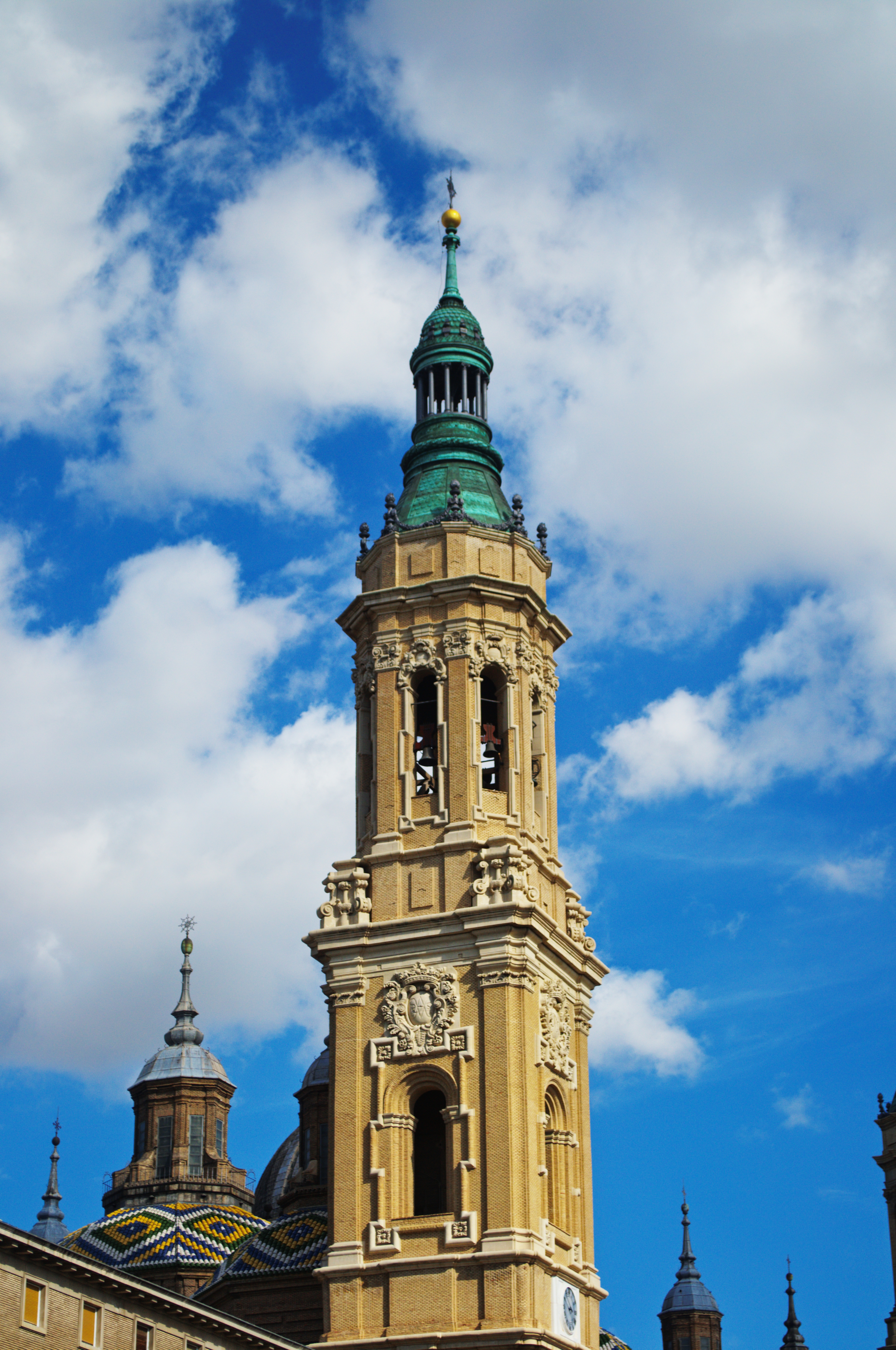 Catedral-Basílica de Nuestra Señora del Pilar de Zaragoza (Aragón, España).